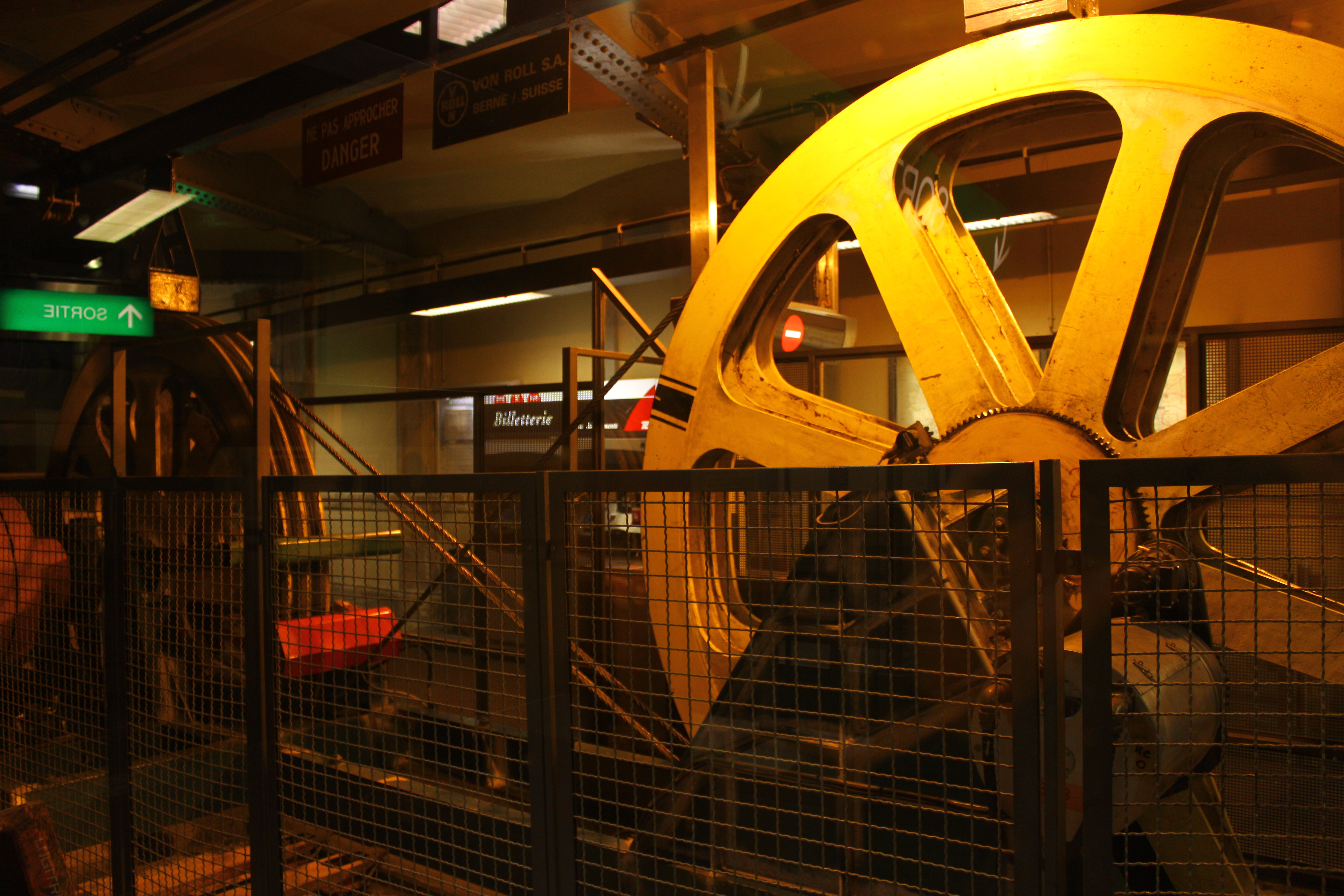 Machinerie du Funiculaire de Fourvière à Lyon situé à la station Fourvière.